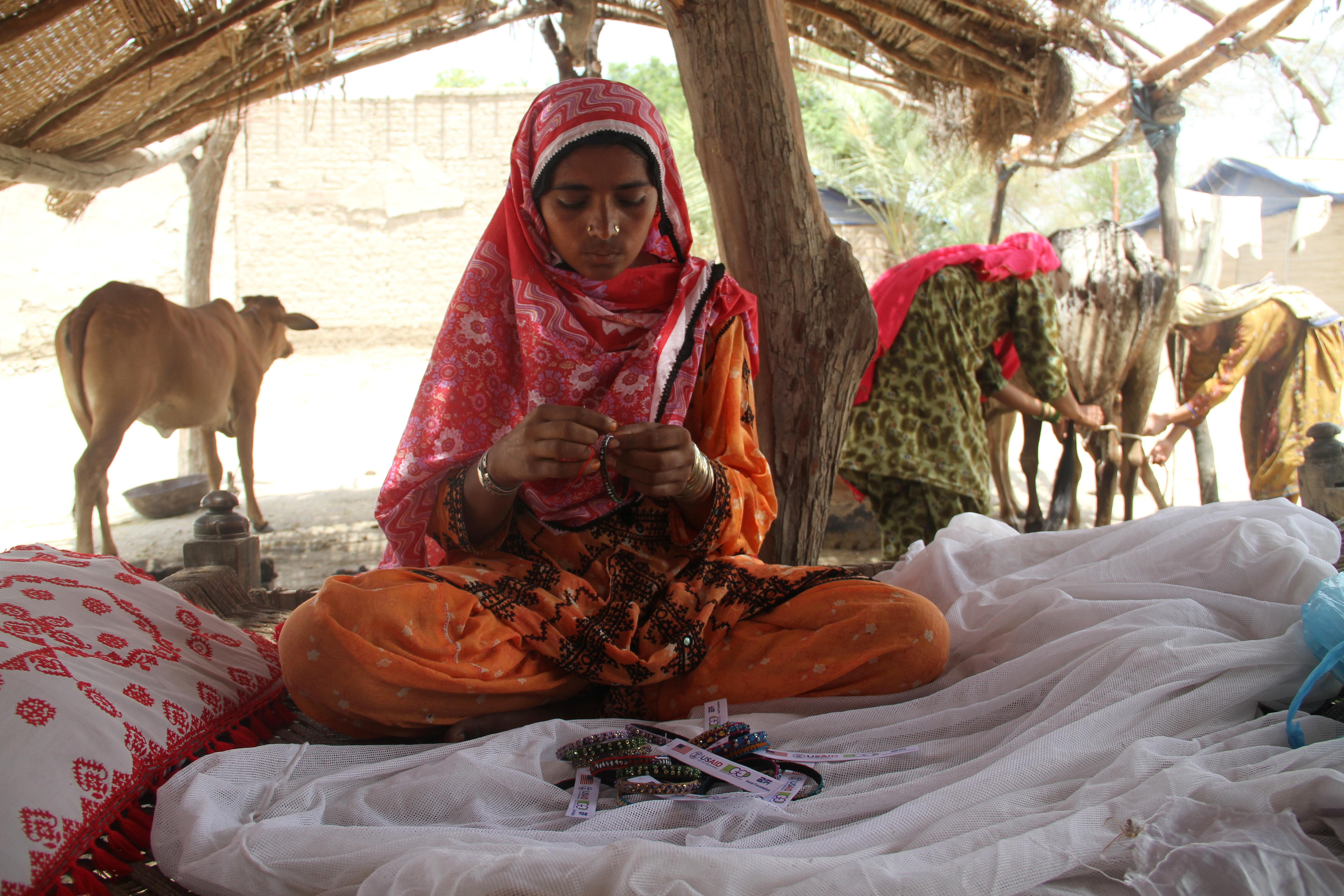 GENDER EQUITY PROGRAM